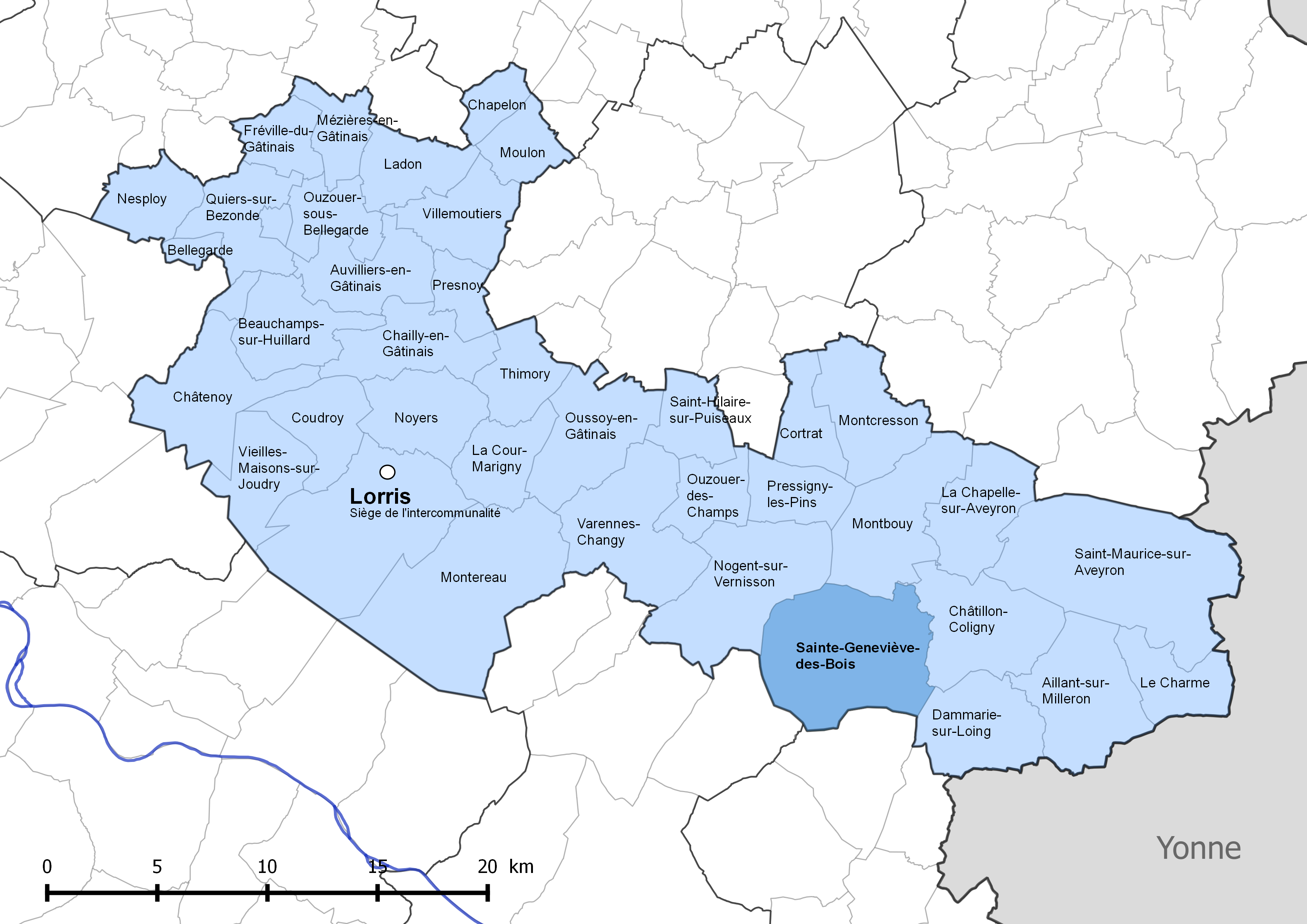 Périmètre de la communauté de communes Canaux et forêts en Gâtinais - Situation de la commune de Sainte-Geneviève-des-Bois (Loiret).